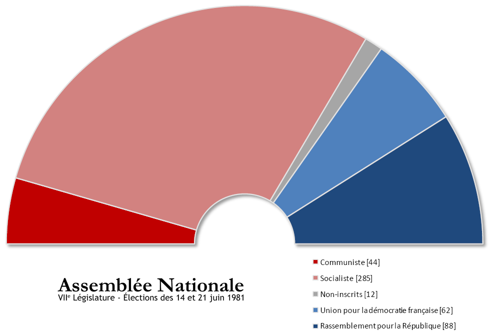 Assemblée Nationale française issue des élections de juin 1981